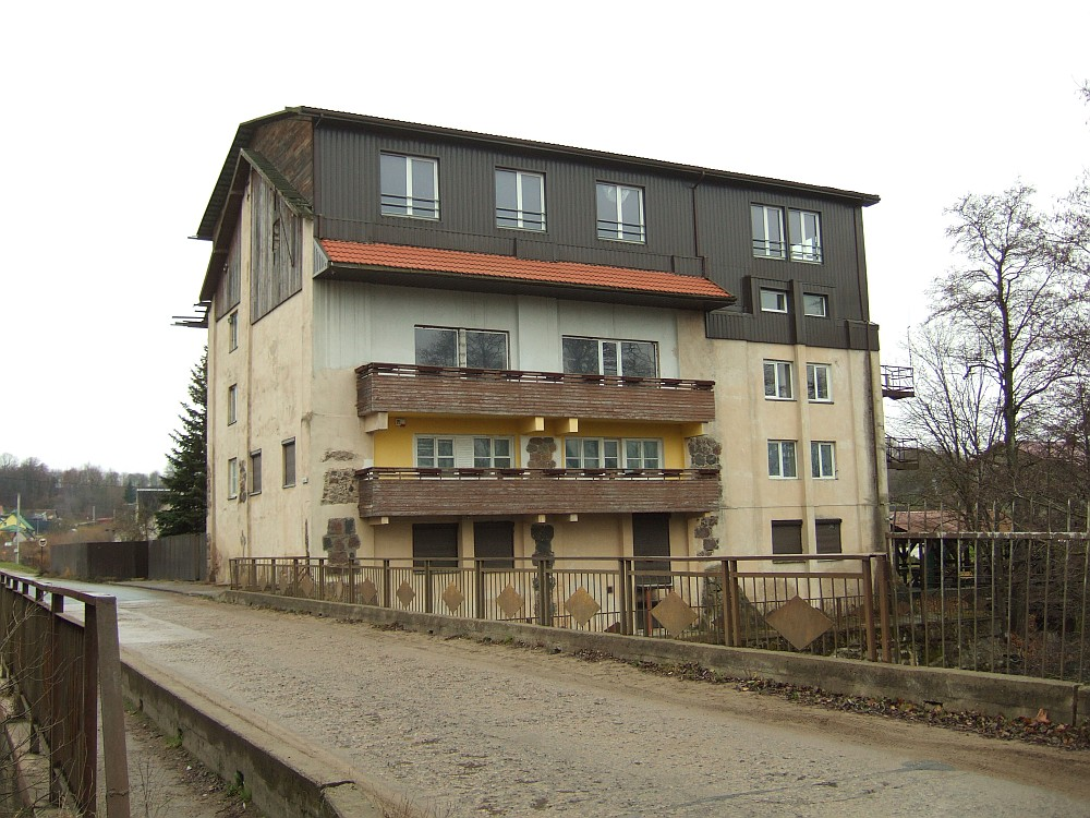 Vaidotų kaimas (Vilniaus rajonas)